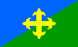 Bandera del Real Valle de Guriezo